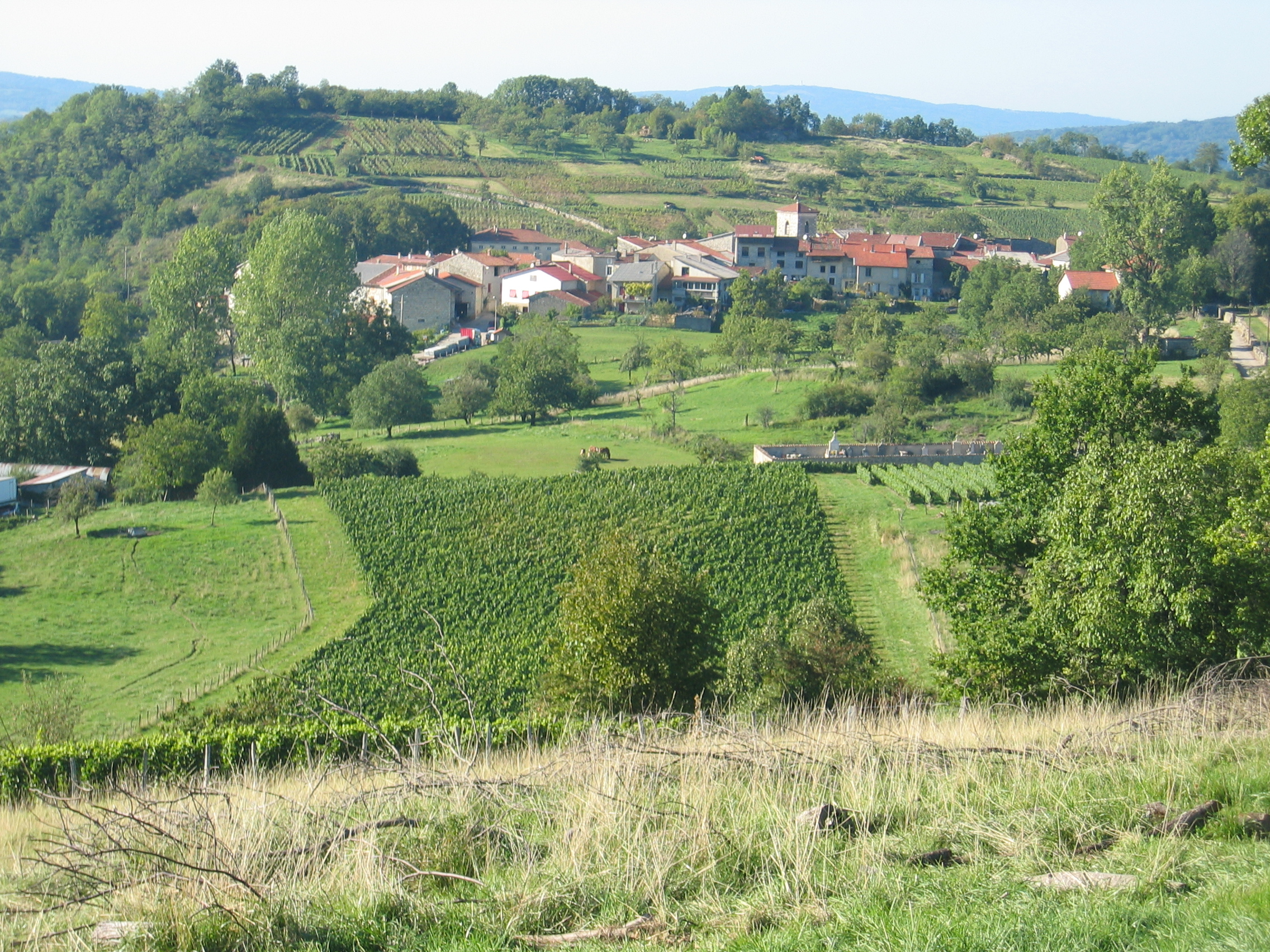 village de Merignat oeuvre personnelle .